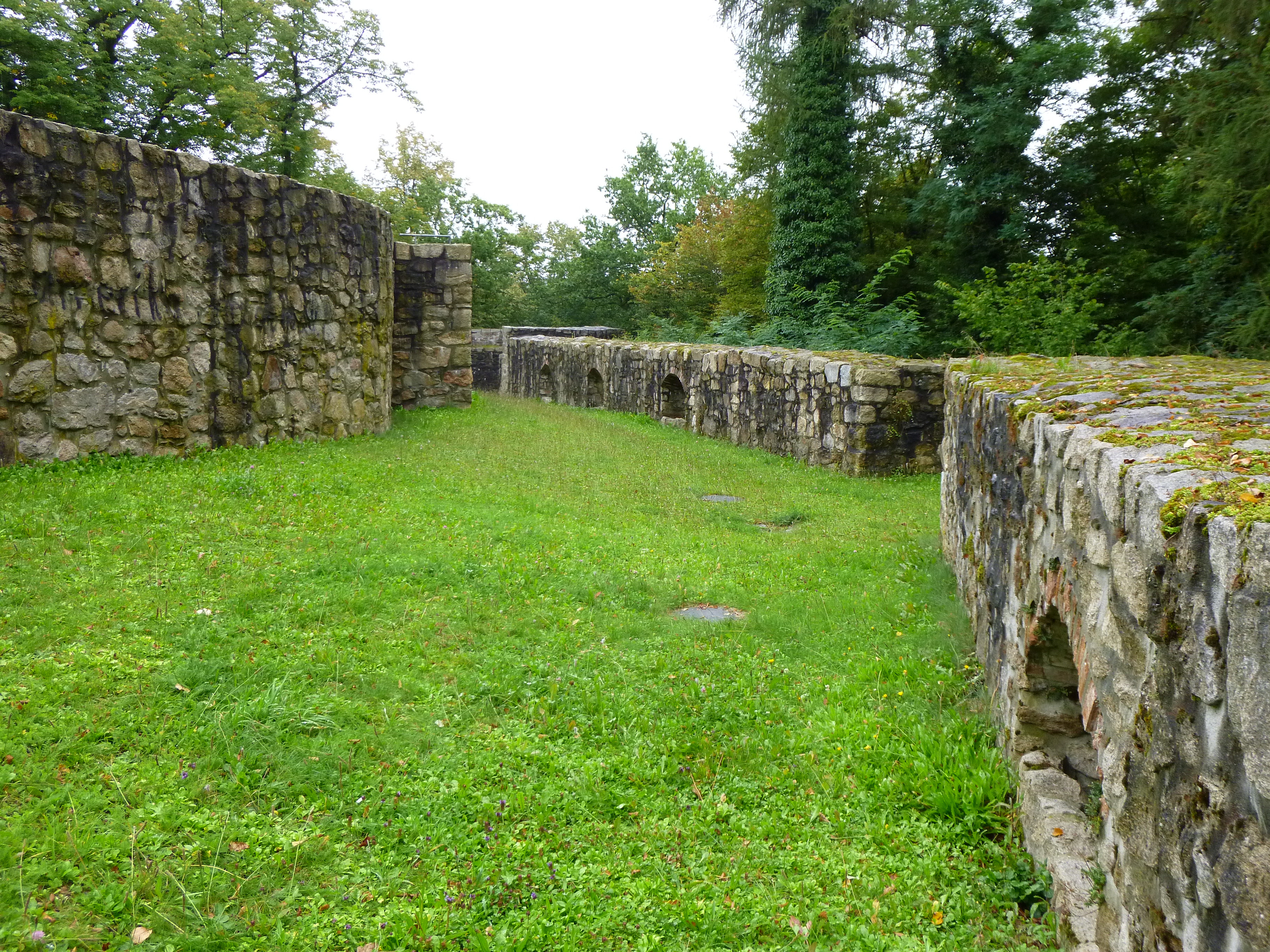 Teile der westlichen Burgmauer des ehemaligen Schlosses in Mittefels.This is a photograph of an architectural monument.